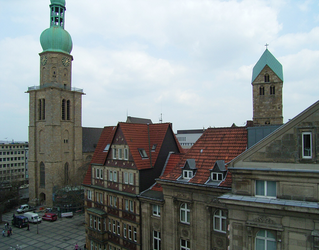 Reinoldikirche und Marienkirche, Dortmund